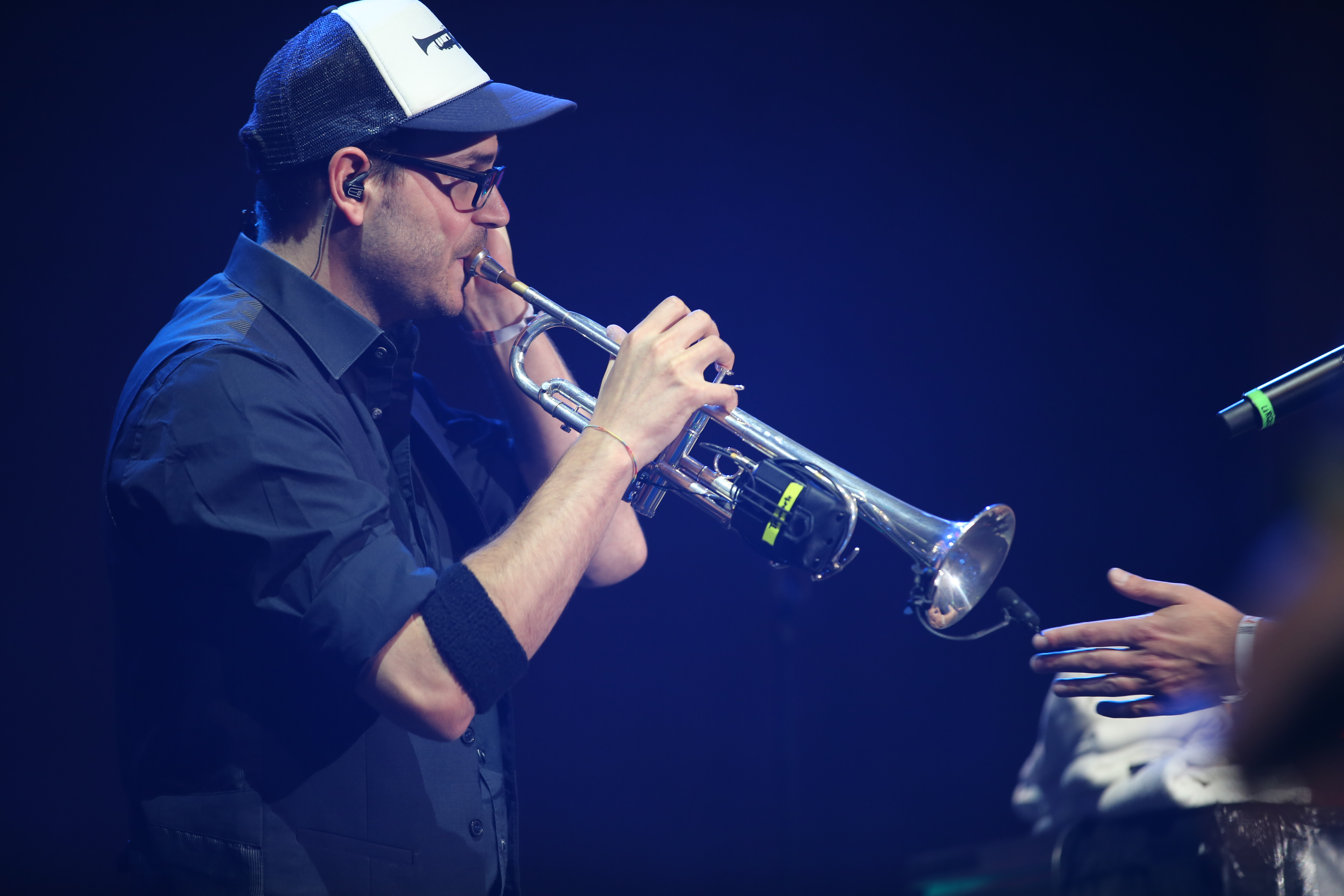 Dicht & Ergreifend (mit Band) auf dem Heimatsound Festival 2016. Im Bild: Sir Mix a Lothar aka Lothar Beyschlag, Trompete